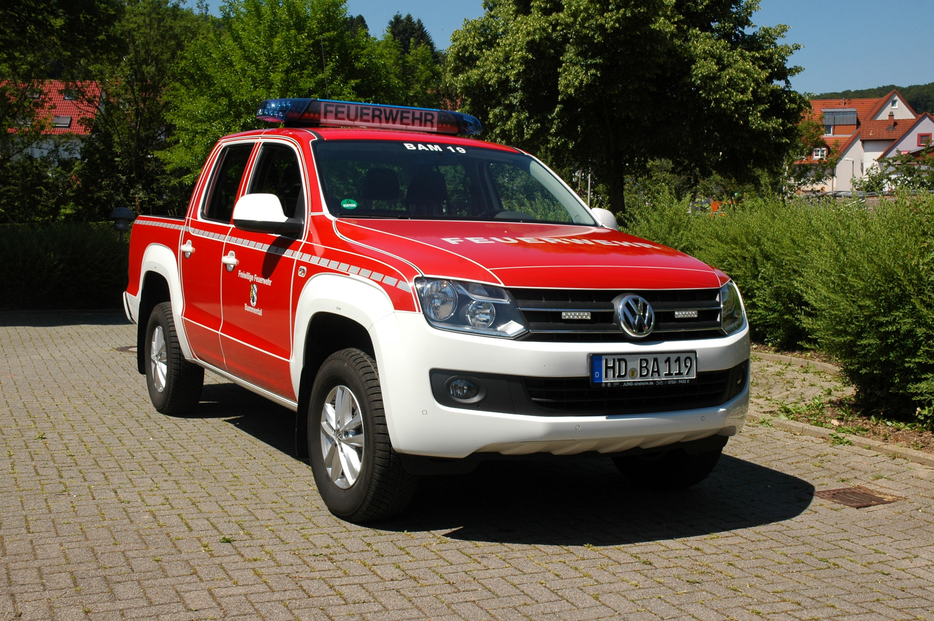 Bammental - Feuerwehr - Volkswagen Amarok HD-BA 119